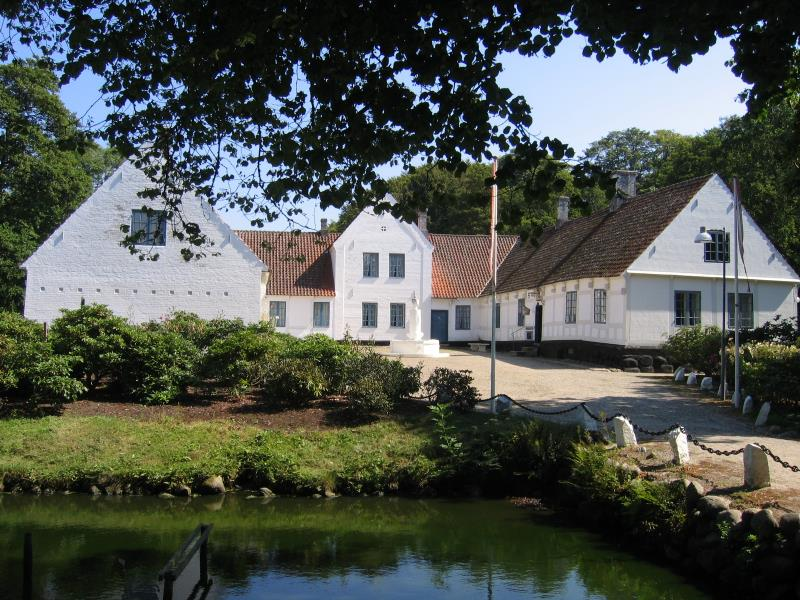 bangsbo-herregard